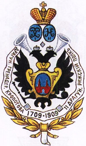 Полковий знак 11-драгунського полку РІА.